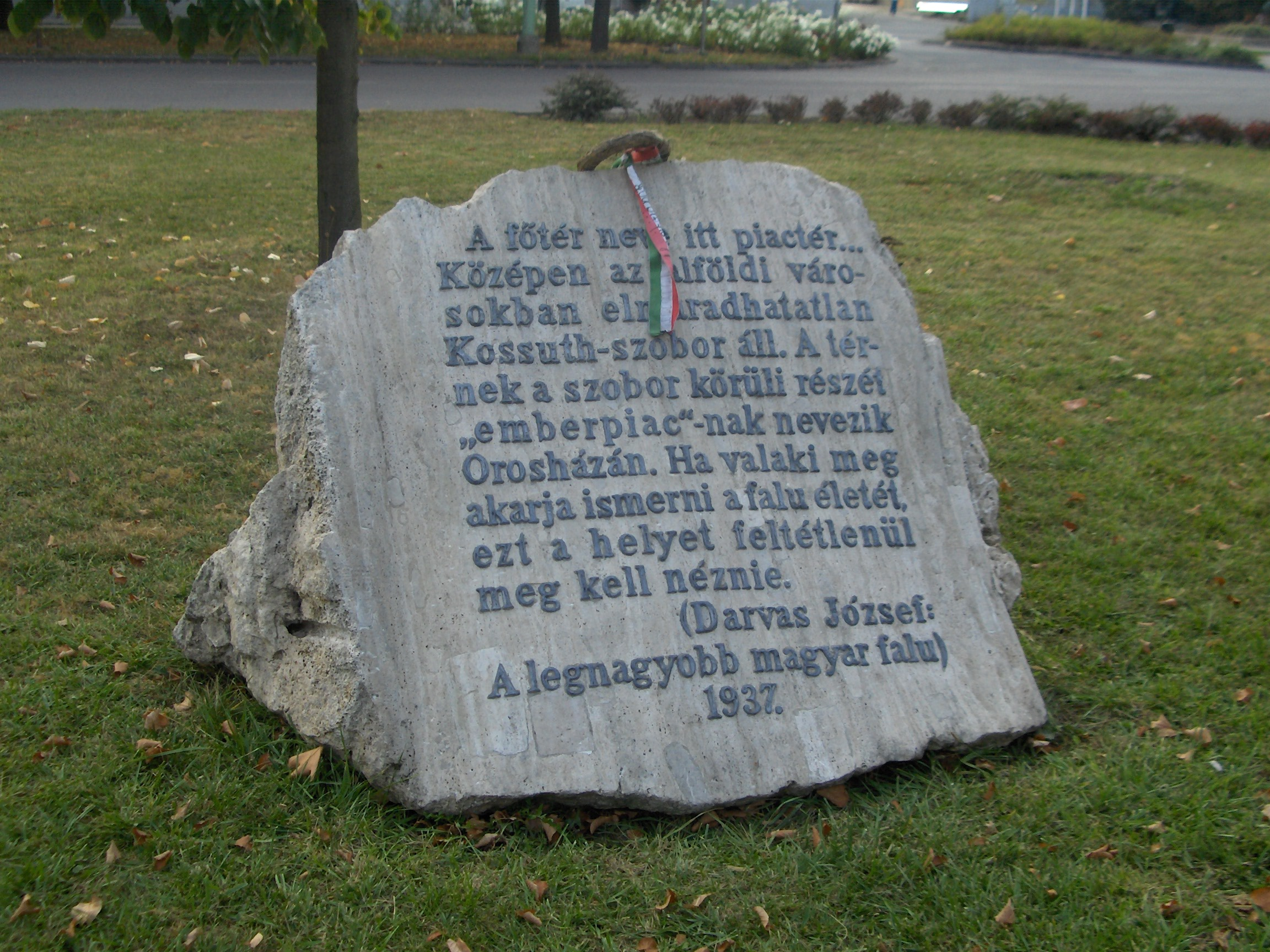 "A legnagyobb magyar falu"